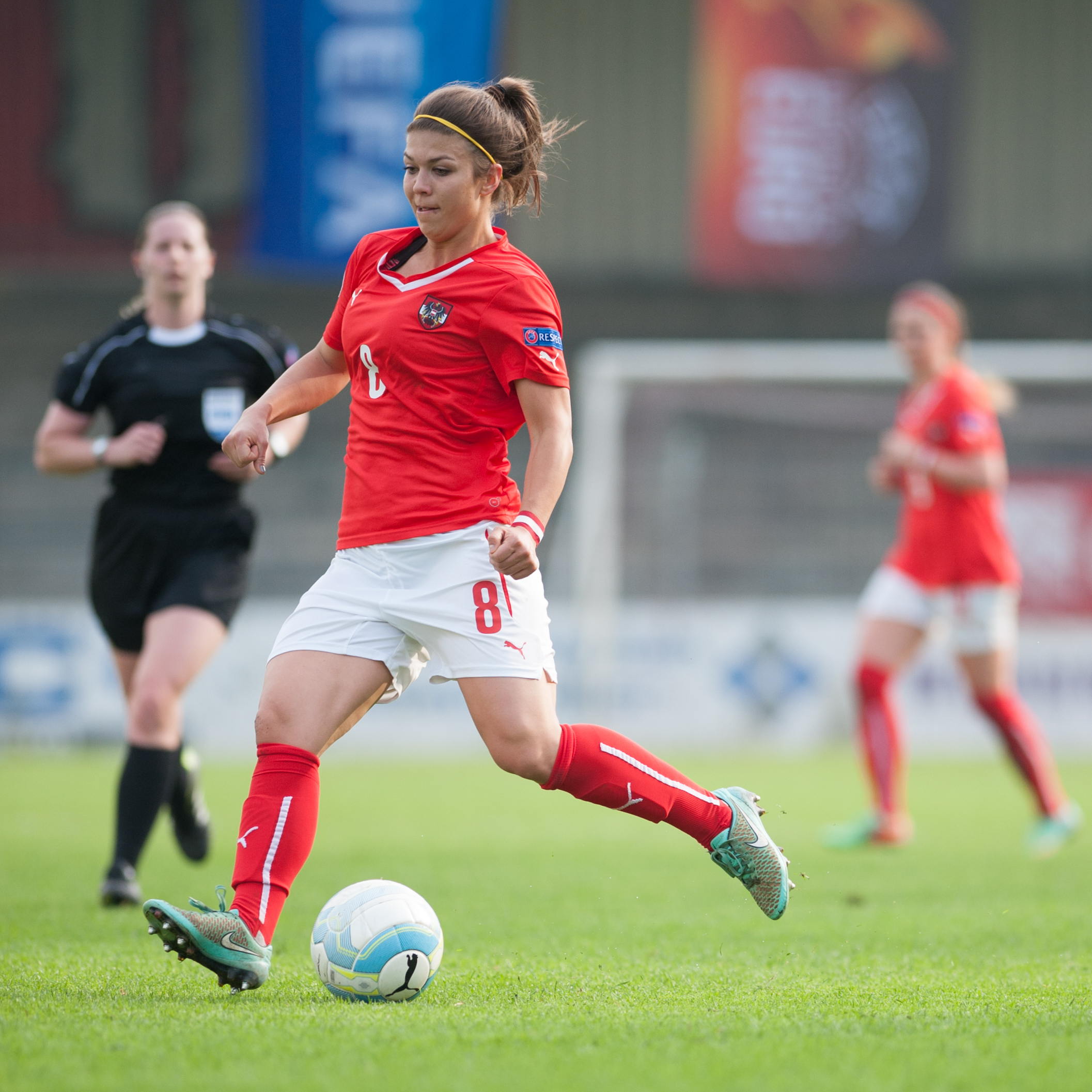 Steyr, Austria, 10.04.2016, ÖFB Frauen EM-Qualifikation - Österreich vs Norwegen. Bild zeigt Nadine Prohaska (AUT).